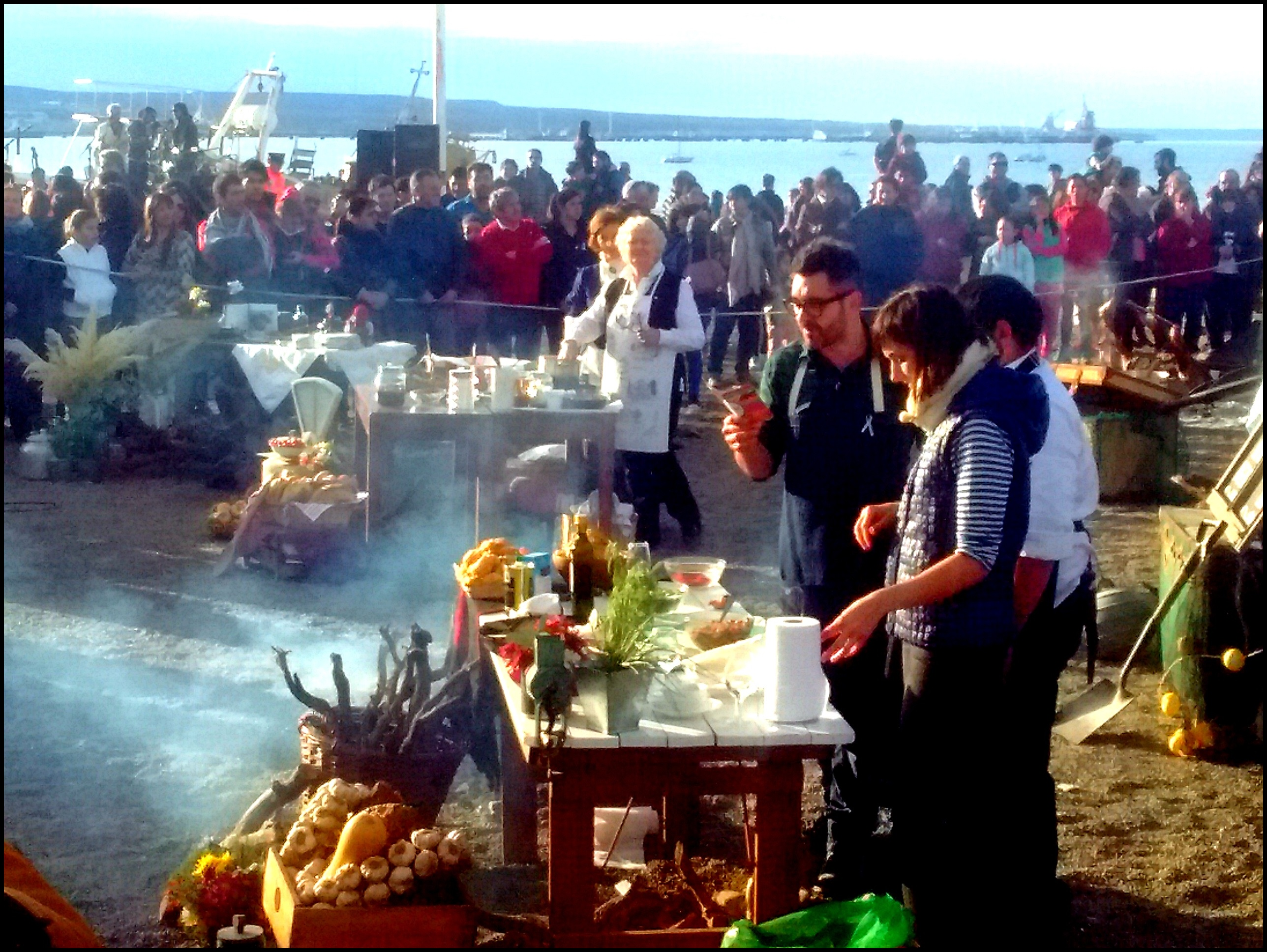 Programa en vivo transmitido desde la playa de Puerto Madryn